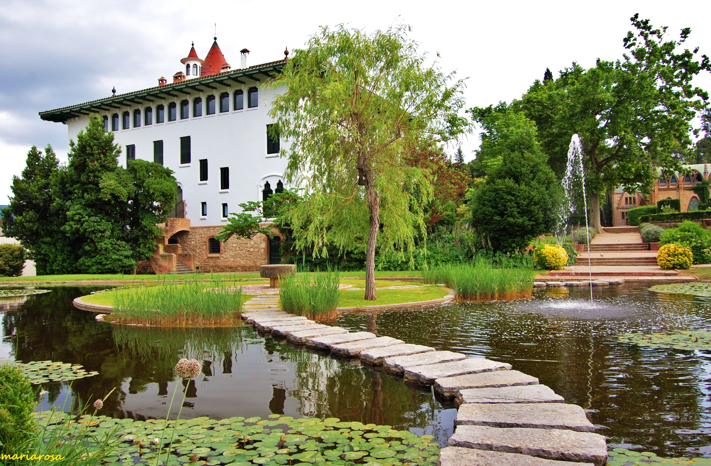 Caves Codorniu (Sant Sadurní d'Anoia)